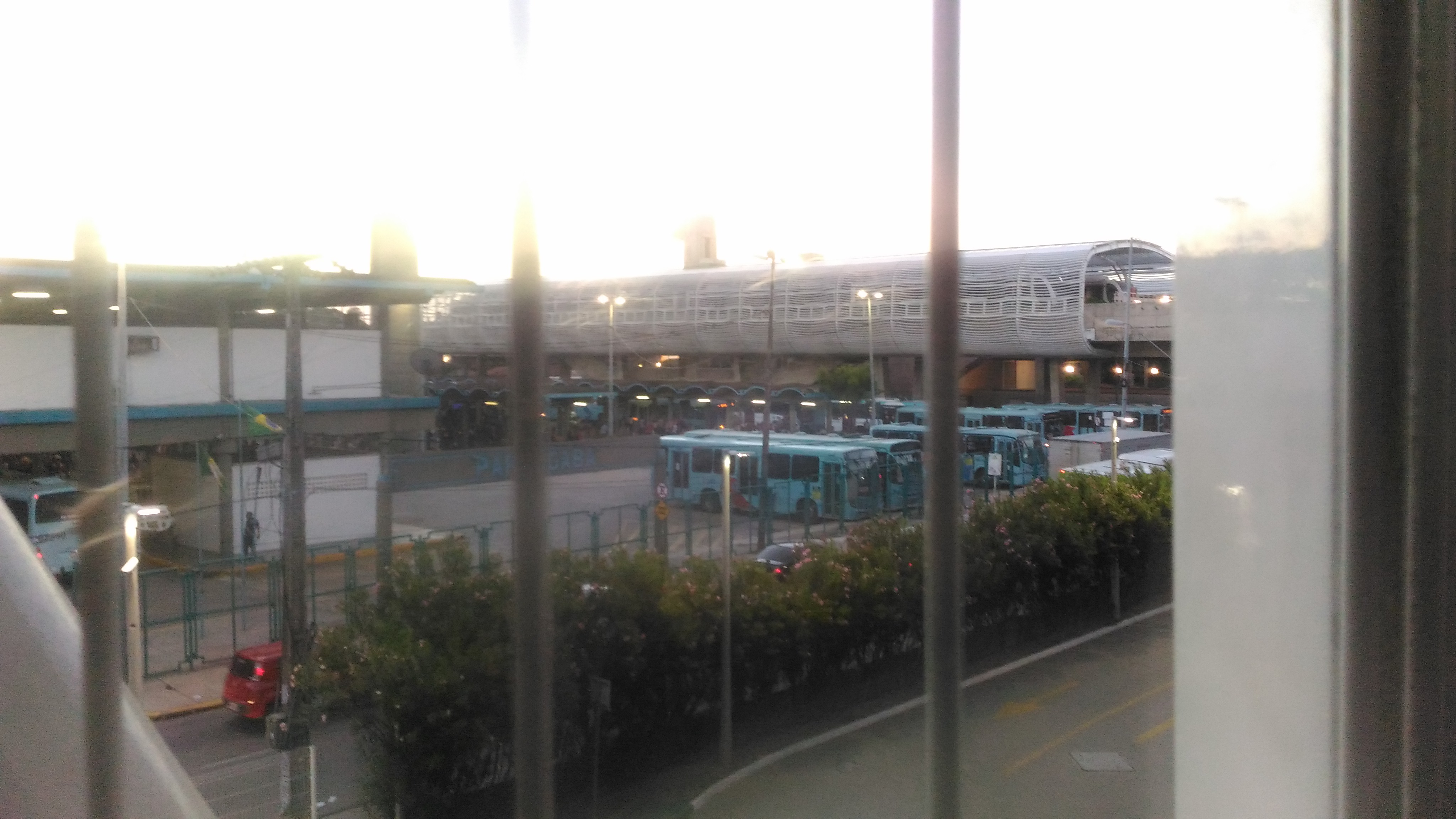 Terminal da Parangaba com estação do metrô e VLT ao fundo.